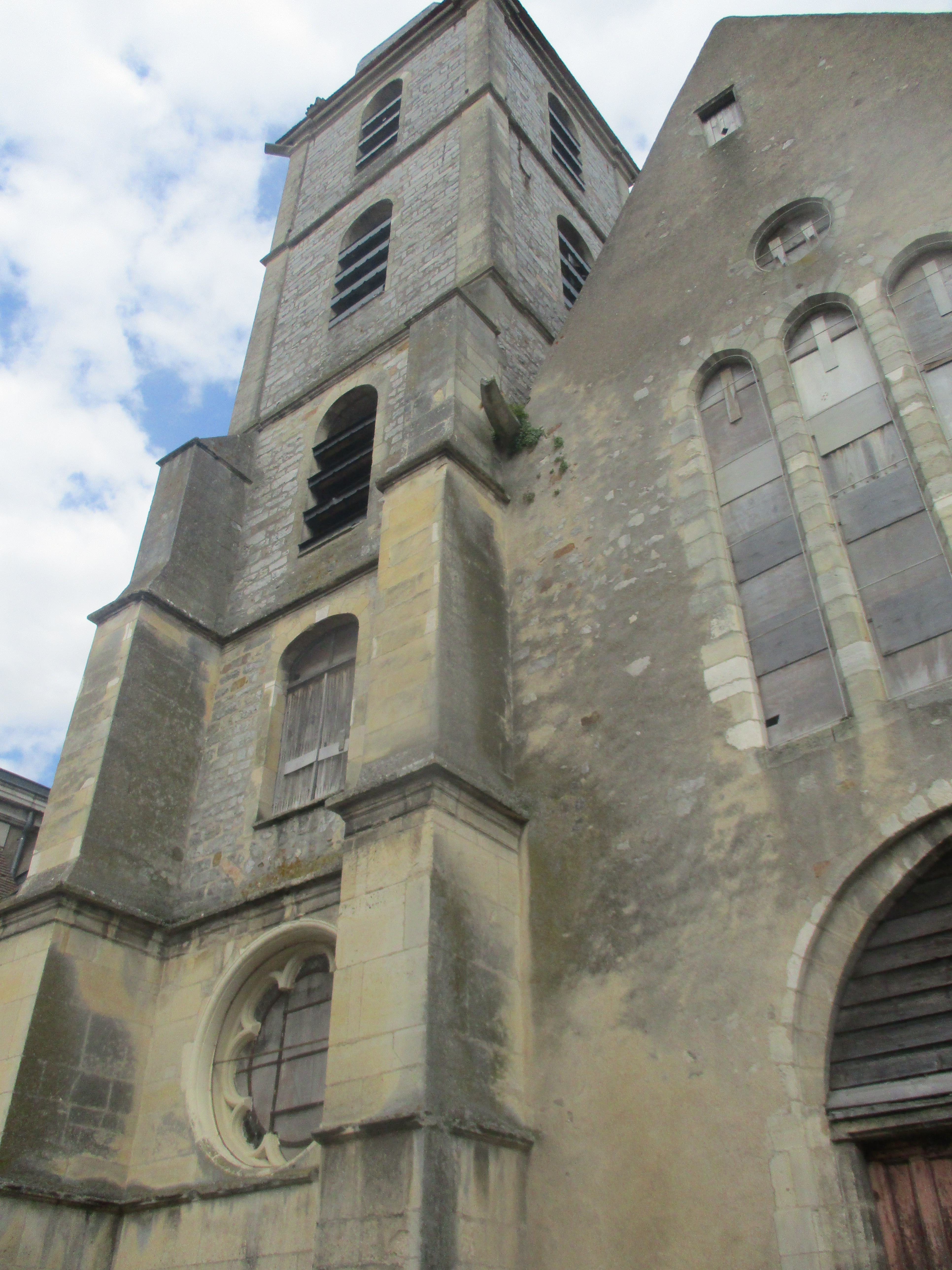 Clocher de l'église Saint-Pierre-le-Rond de Sens en juillet 2016.